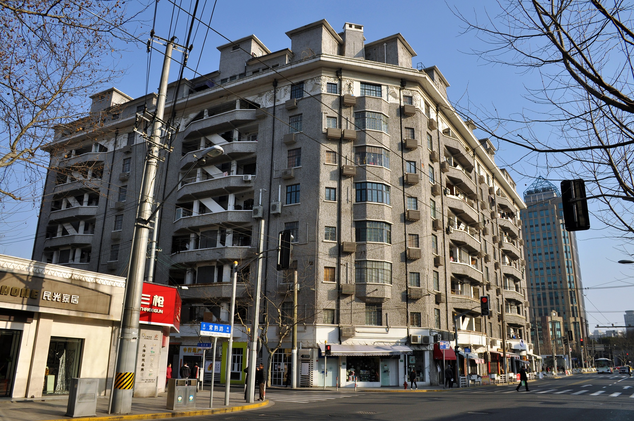 赛华公寓 瑞华公寓 常熟路209号 1928（始建）